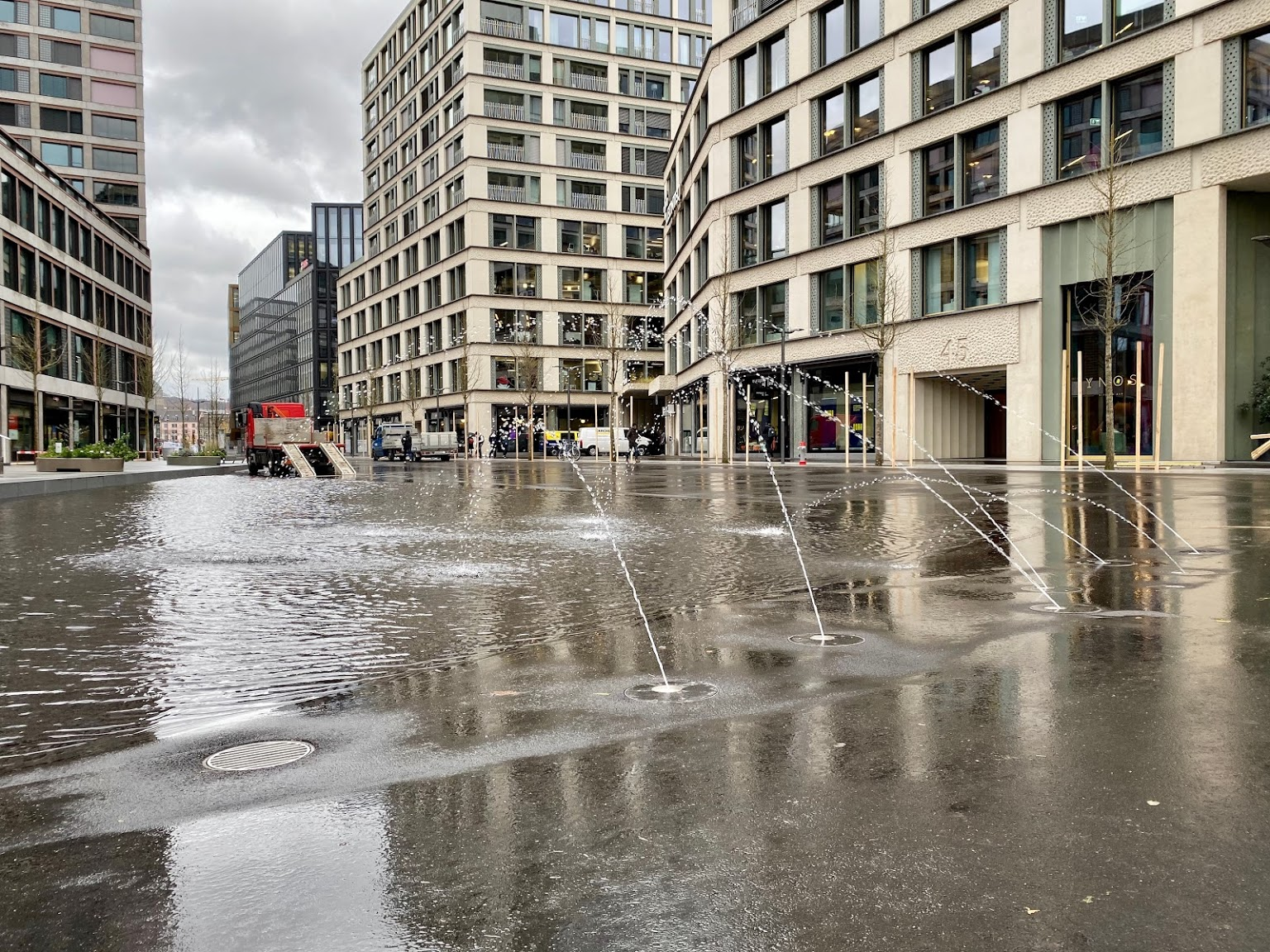 L'Euroflaque et ses jets, vue de face.